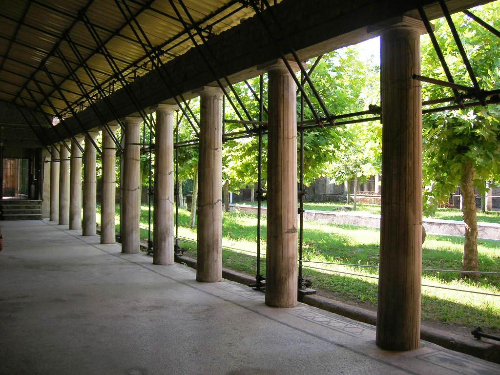 Villa San Marco a Stabia - Colonnato peristilio invernale.